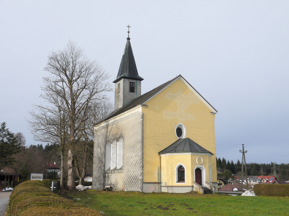 Kath. Filialkirche Maria Hilf